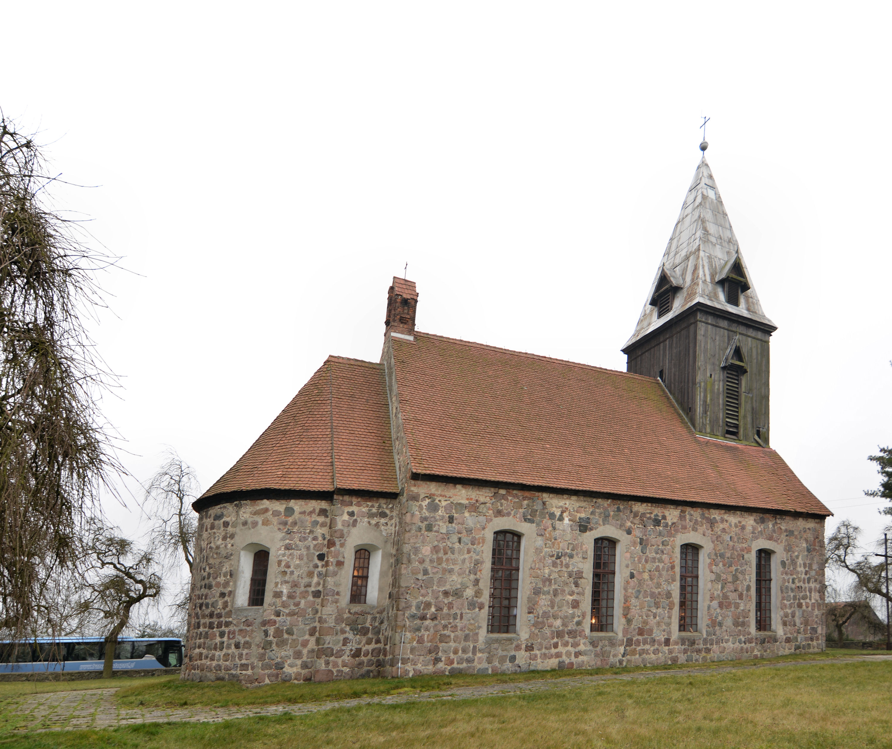 Czachów - rzymskokatolicki kościół parafialny p.w. MB Częstochowskiej, 2 poł. XIII